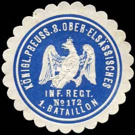 Sealing stamp Title: K. Pr. 3. Ober-Elsässisches Infanterie Regiment No. 172, 1. Bataillon Description: Place: Neubreisach size: 4 cm